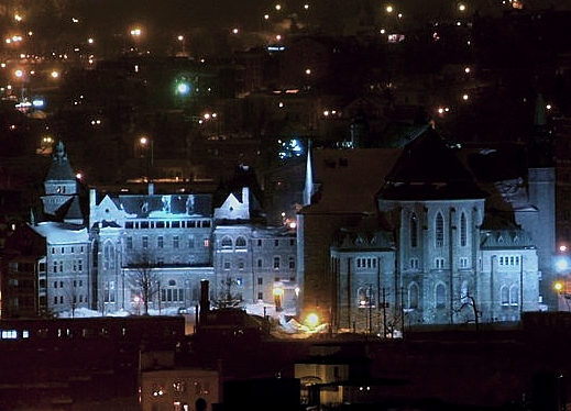 Centre-ville de Sherbrooke, Québec